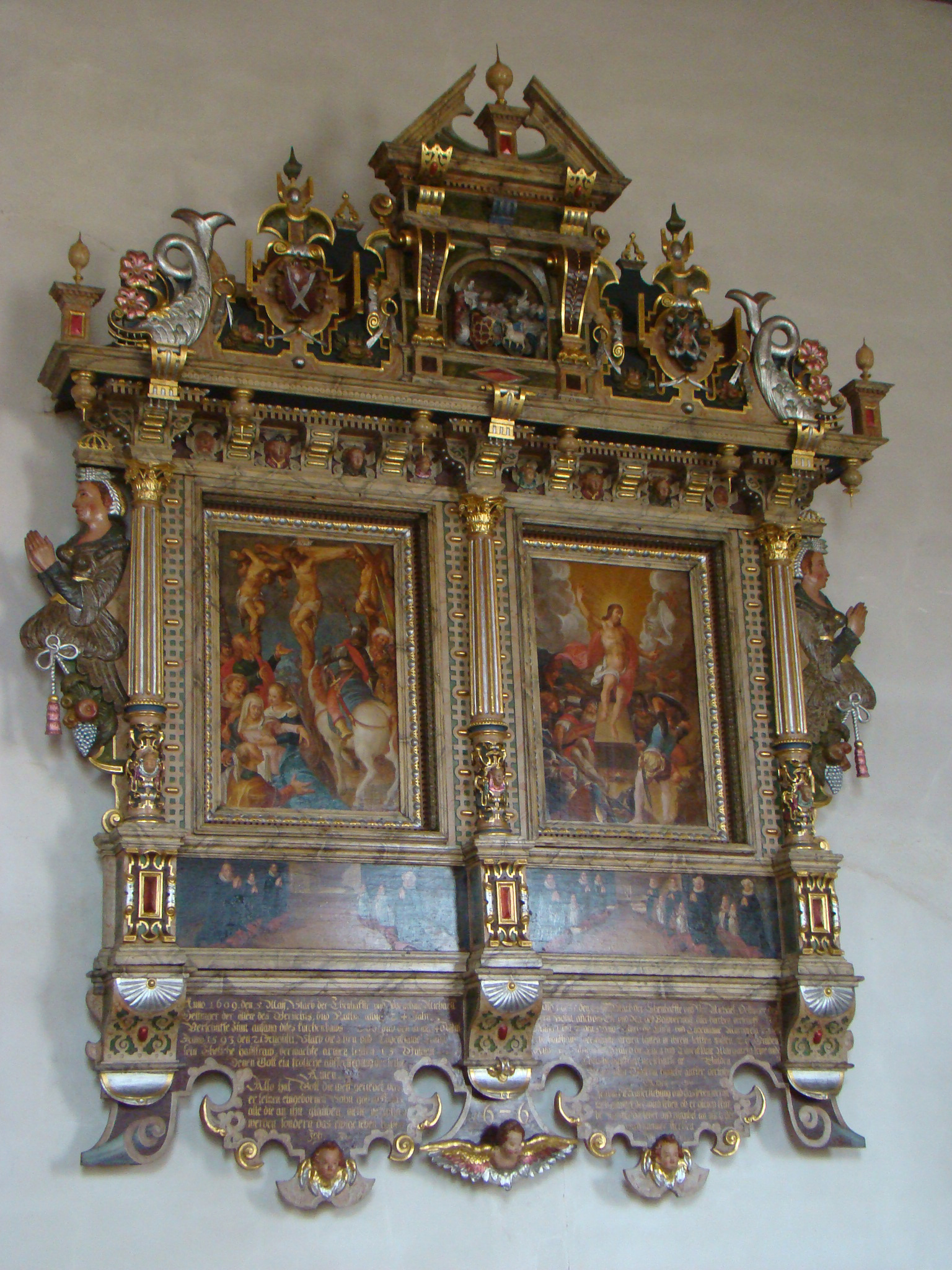 Epitaph in der Kilianskirche in Obersulm-Sülzbach